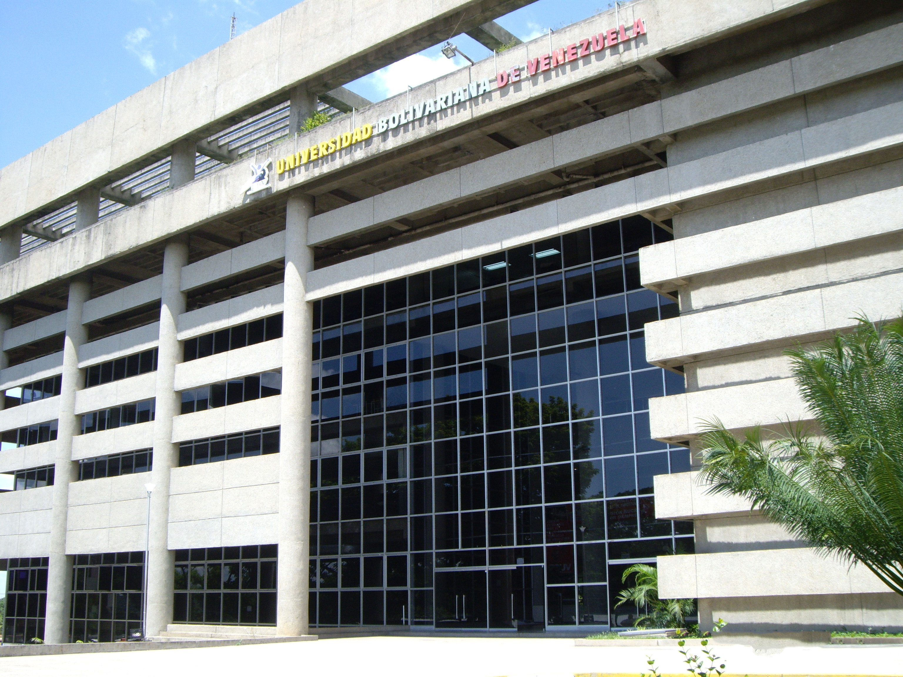 Entrada principal de la UBV sede Ciudad Bolívar, estado Bolívar Venezuela, Sur América